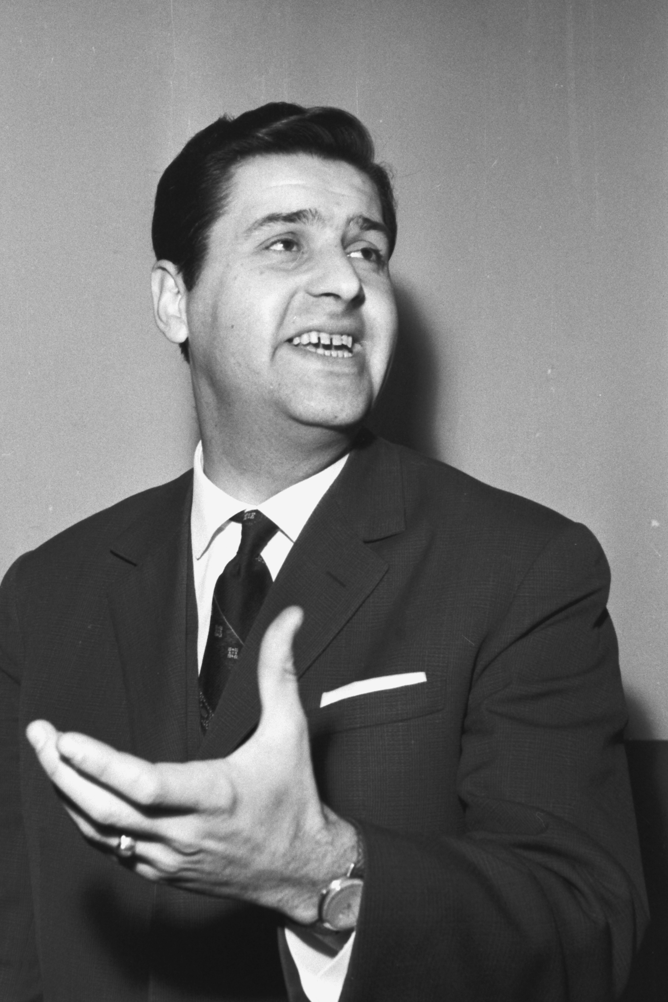 Predrag Gojković – Cune (1932—2017), srpski pevač narodnih pesama, 1962. godine.